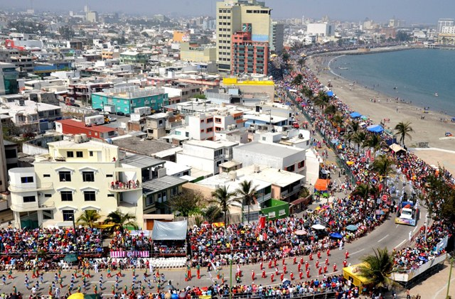 vemos el bulevar por donde pasa el carnaval de Veracruz mexico